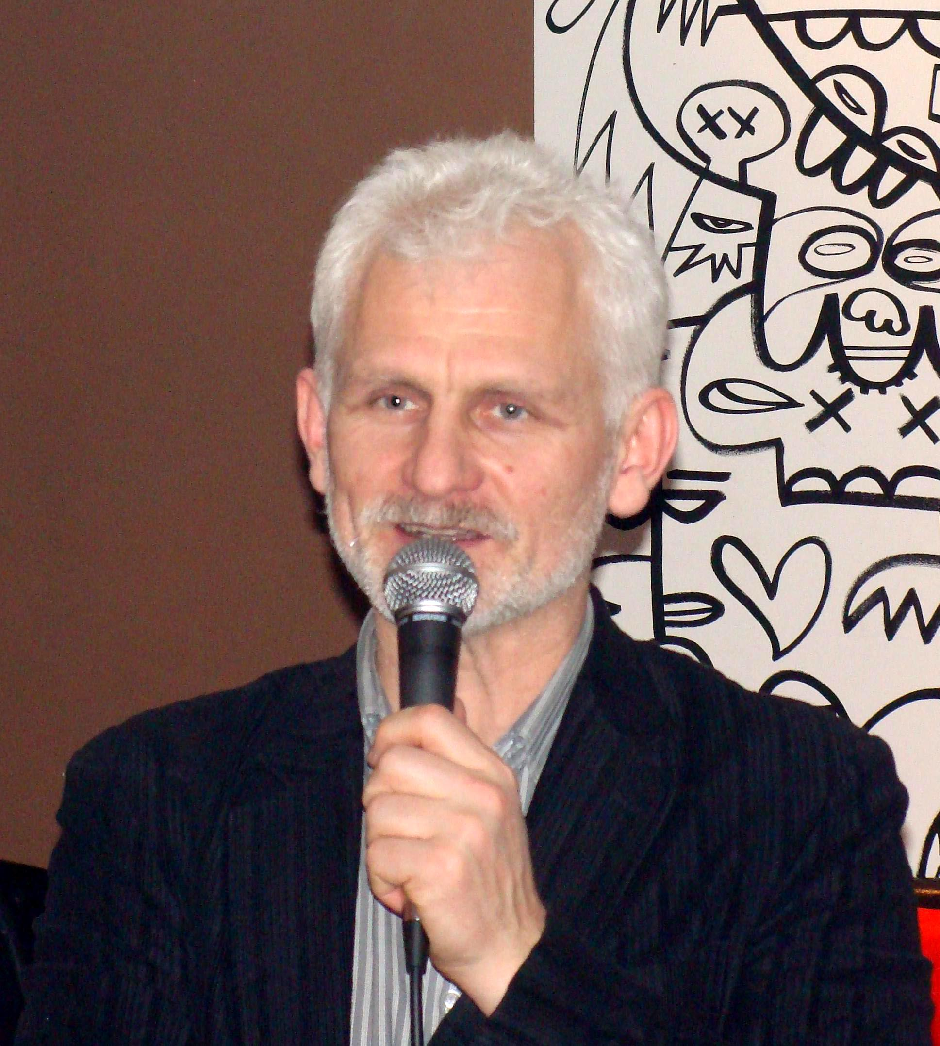 Alaksandr Bialacki, białoruski obrońca praw człowieka, w czasie spotkania w klubie "Grawitacja" w Warszawie, 14 stycznia 2011 roku.